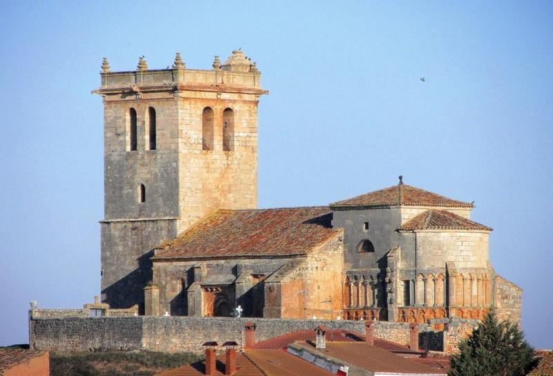 Iglesia de San Pedro, Castrillo Solarana, provincia de Burgos.